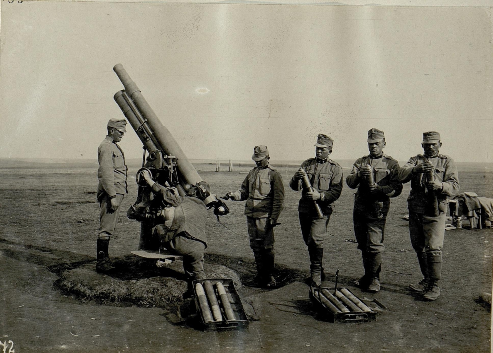 Flieger Abwehr in Podhajce.